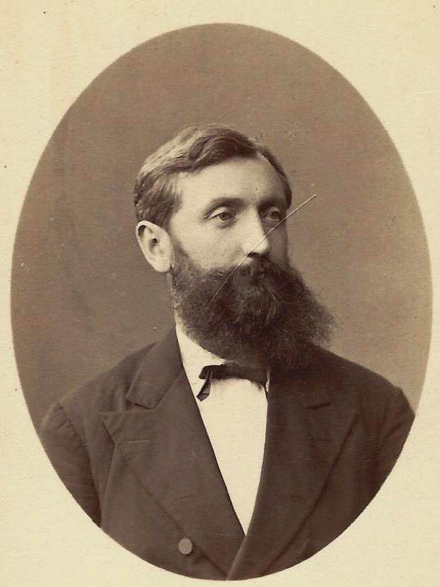 Portrait